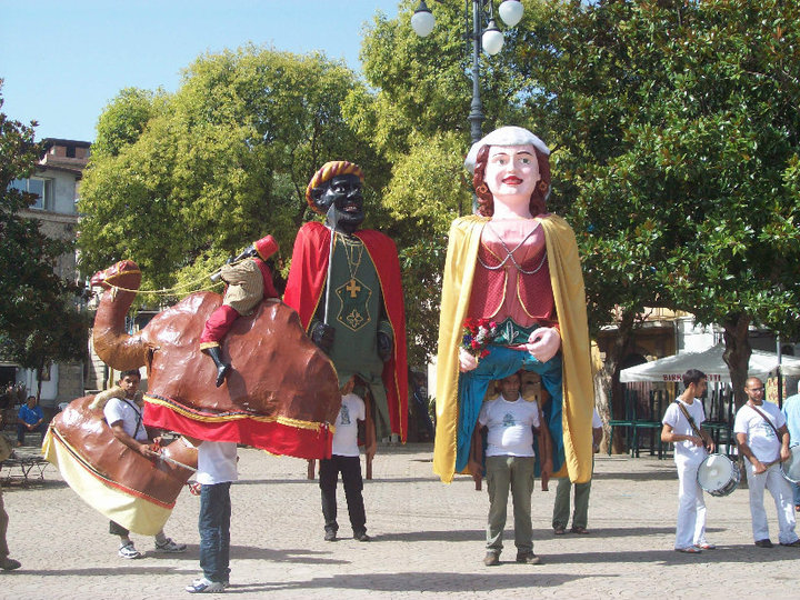 Giganti Mata e Grifone a Seminara